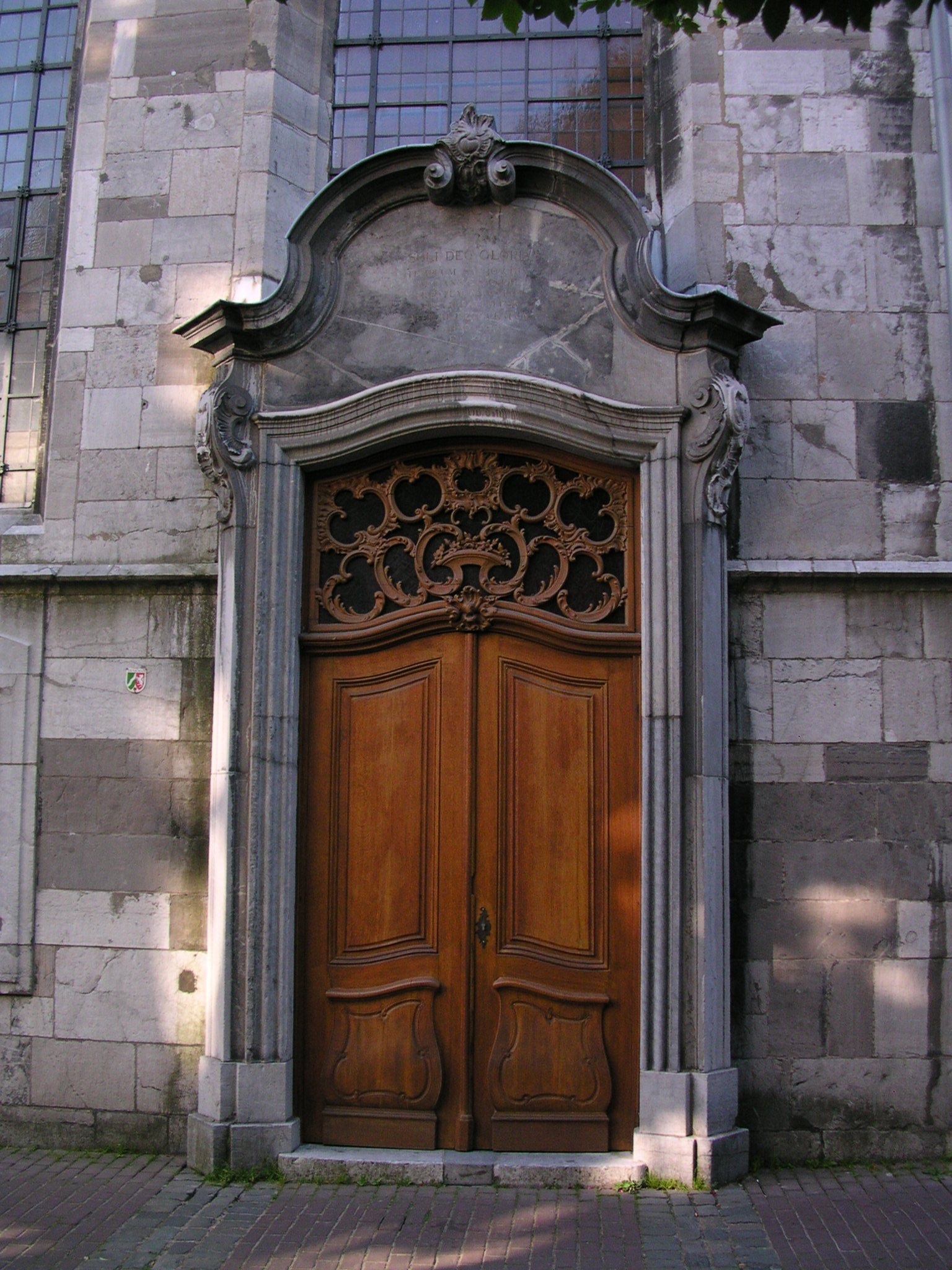 Aachen, evangelische Annakirche in der Annastraße